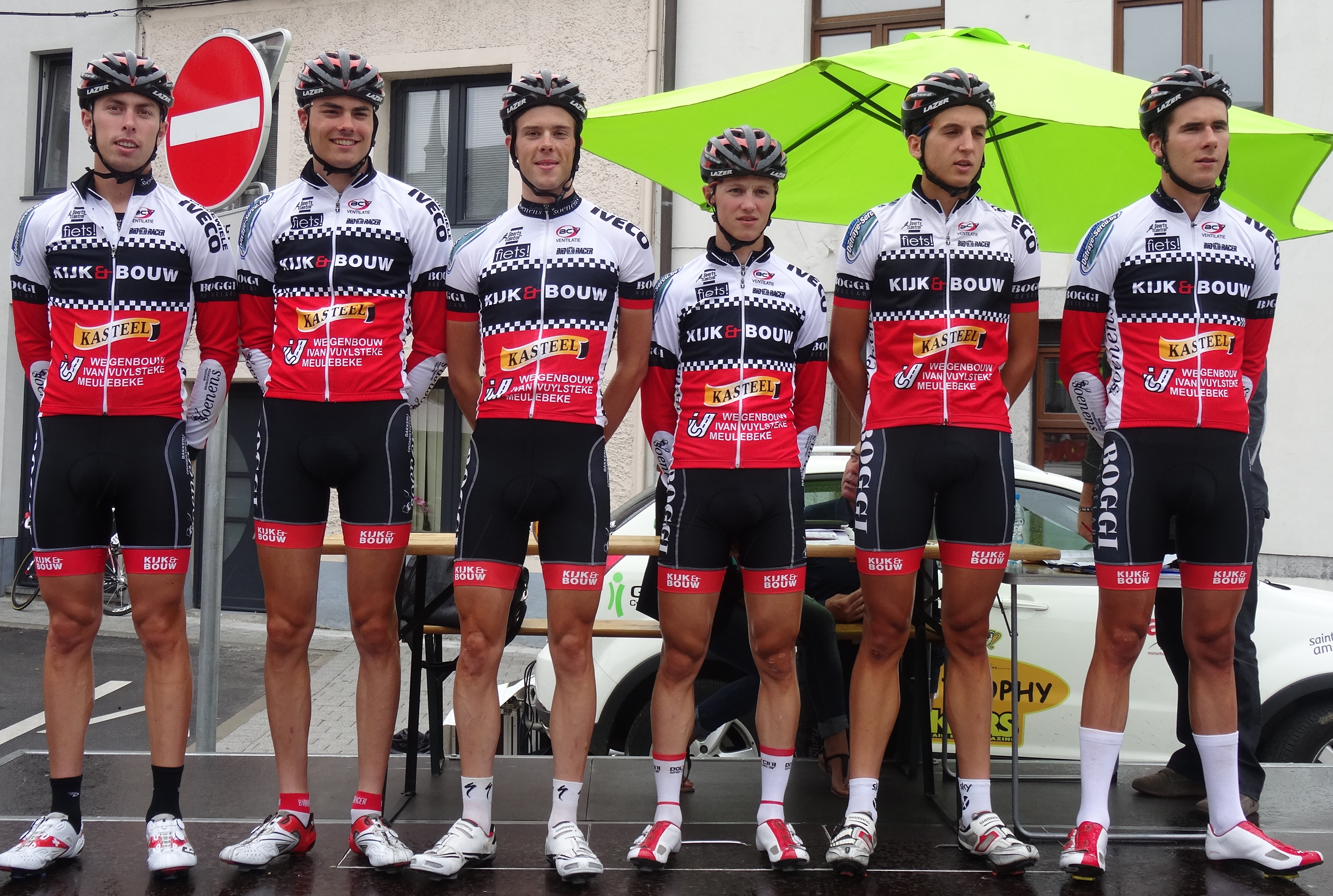 Reportage photographique réalisé le mercredi 6 août à l'occasion du départ de la première étape du Tour de la province de Namur 2014 à Jambes (Namur), Belgique.